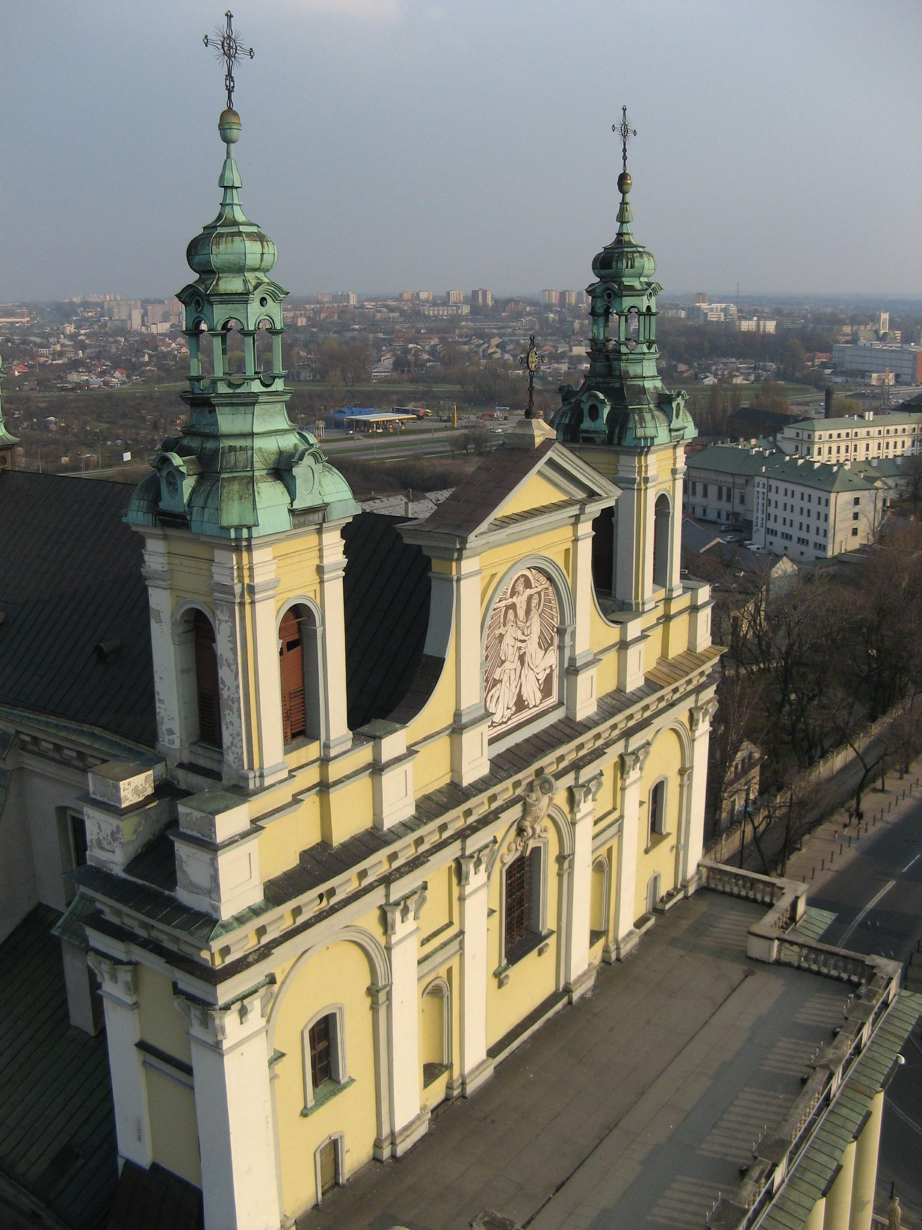 Archikatedra w Lublinie, widok z Wieży Trynitarskiej